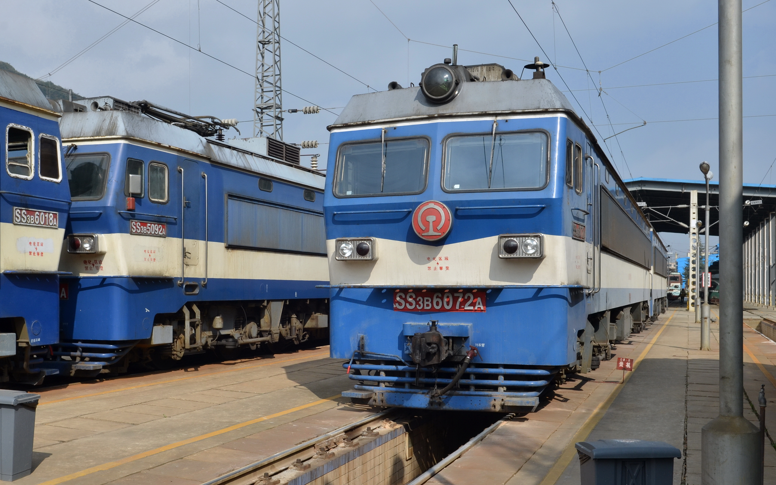 SS3B型电力机车，拍摄于贵阳机务段整备场。